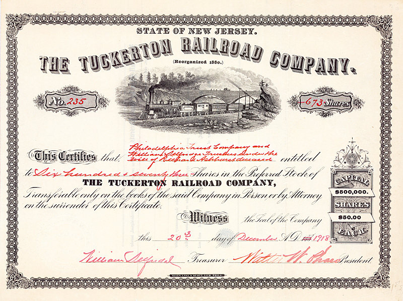 Aktie der Tuckerton Railroad Company vom 20. Dezember 1918